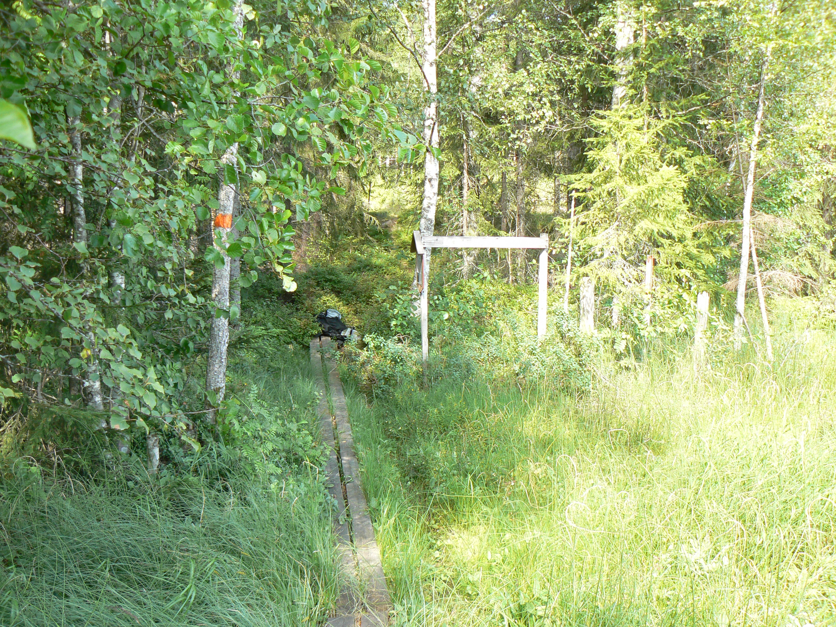 The Siljansleden walking route, Lake Siljan area, Sweden. Photo from near Lake Svarttjärn.